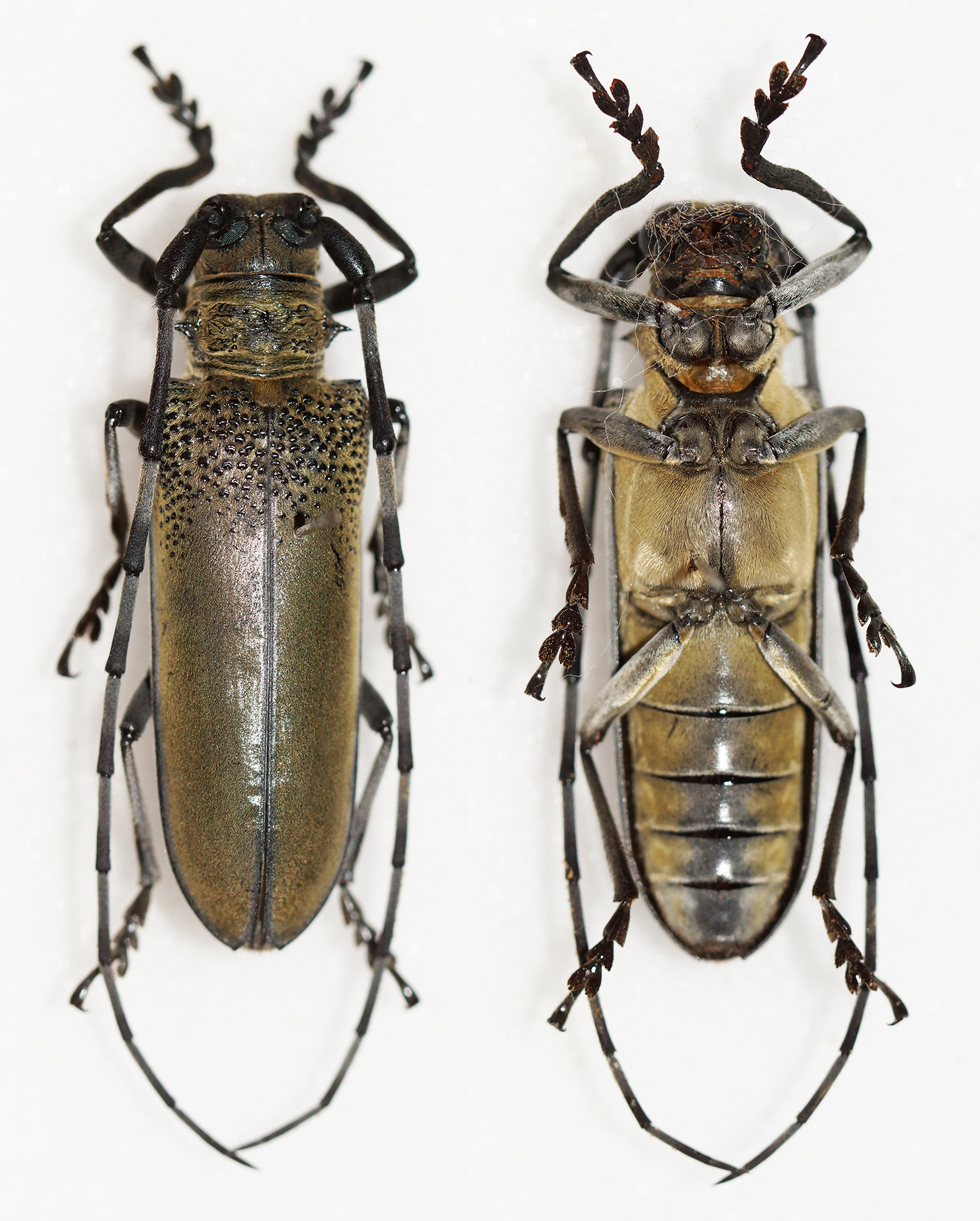 Thomson, 1878 Sex: Male Data: 19-07-14 - Akatsuka - Itabashi Ward - Tokyo - Japan Size: 36.5mm